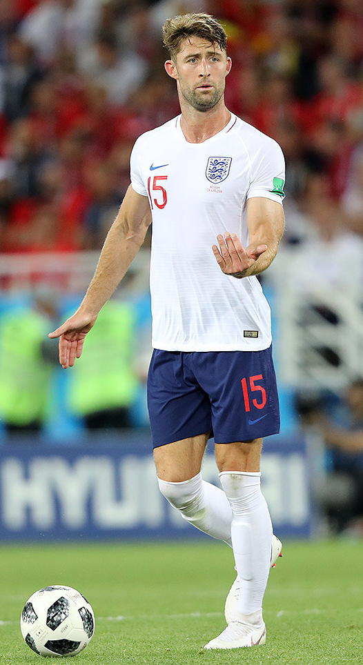 Второй состав сборной Бельгии оказался сильнее резерва англичан на ЧМ-2018